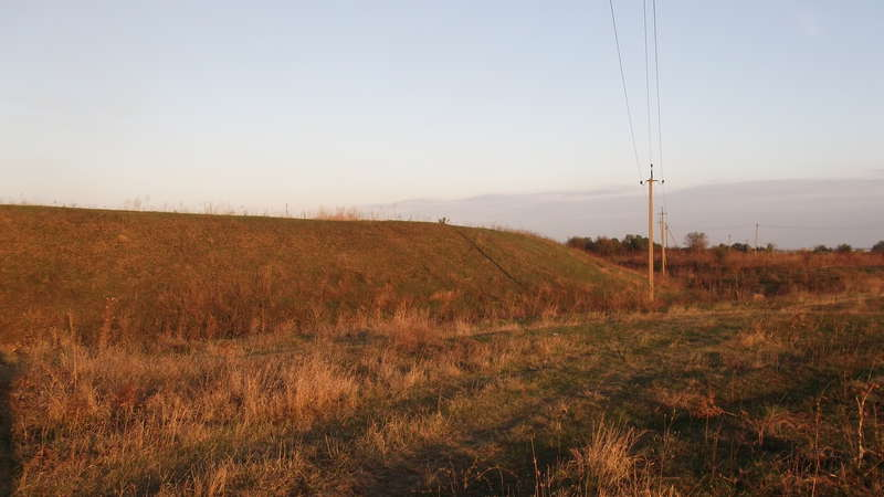 Вид на Ошхануко